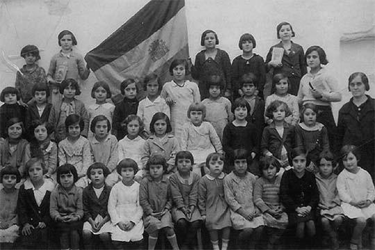 Escuela de la localidad sevillana El Saucejo (España), hacia 1931.